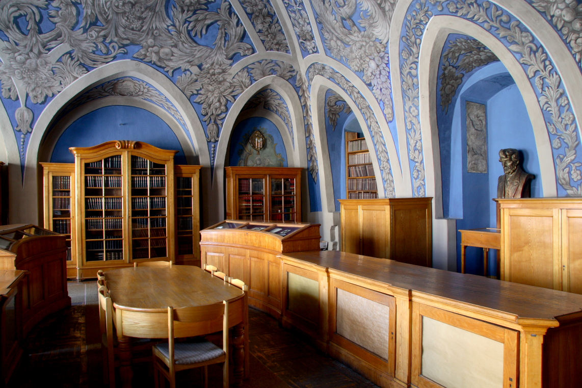 VU bibliotekos J.Lelevelio salė